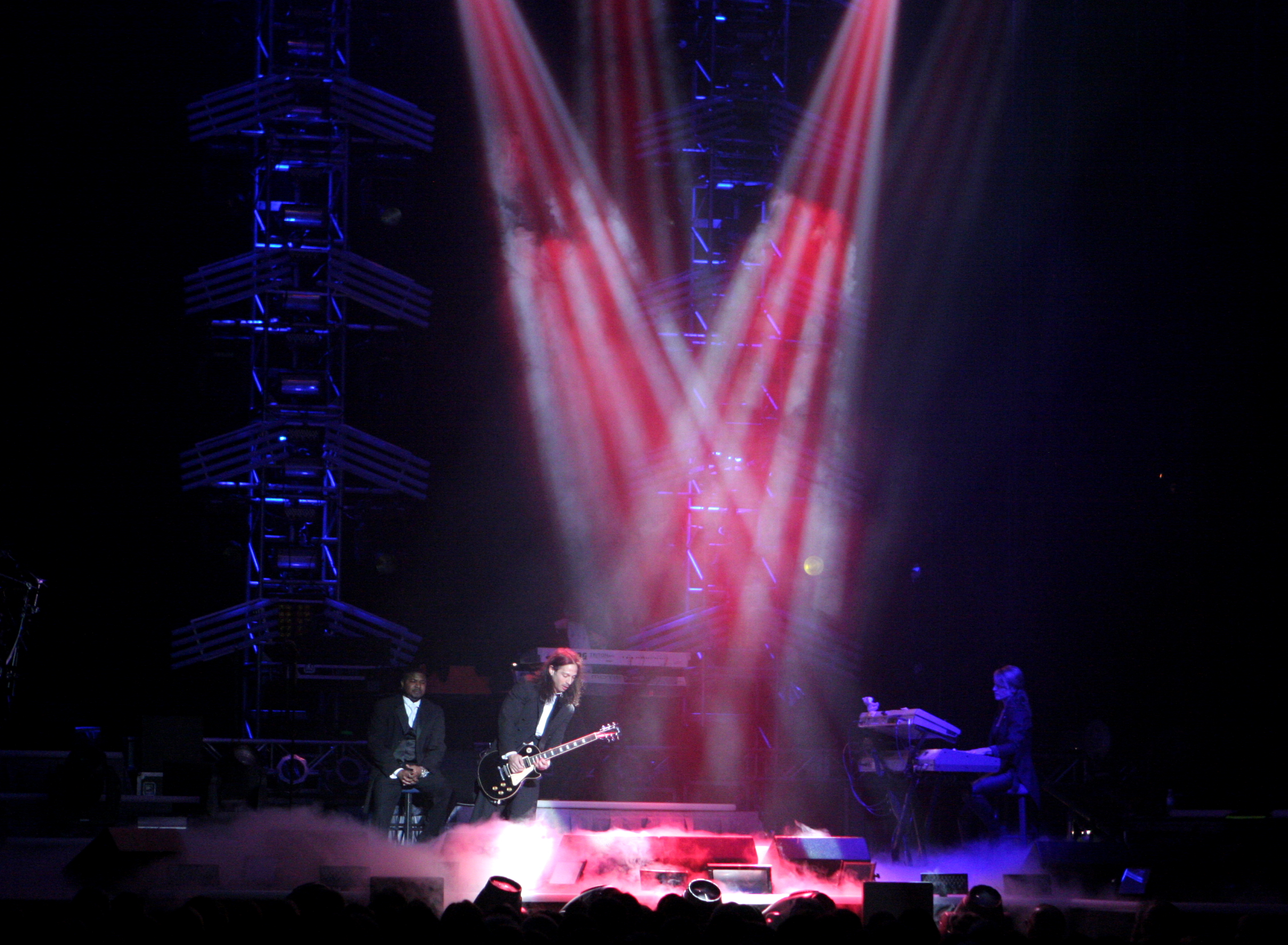 Trans-Siberian Orchestra